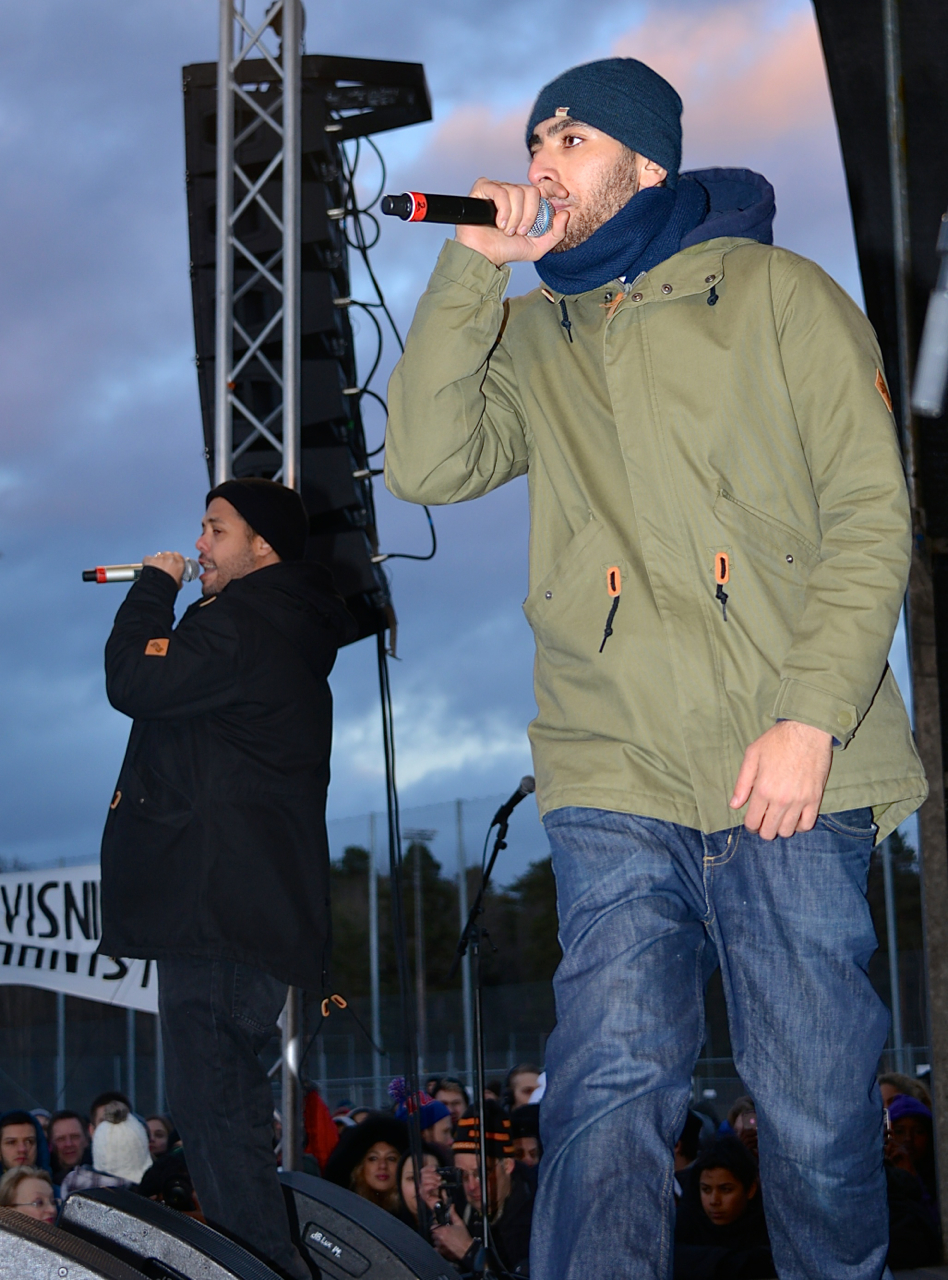 Mohammed Ali i Antirasistdemonstrationen i Kärrtorp den 22 december 2013.